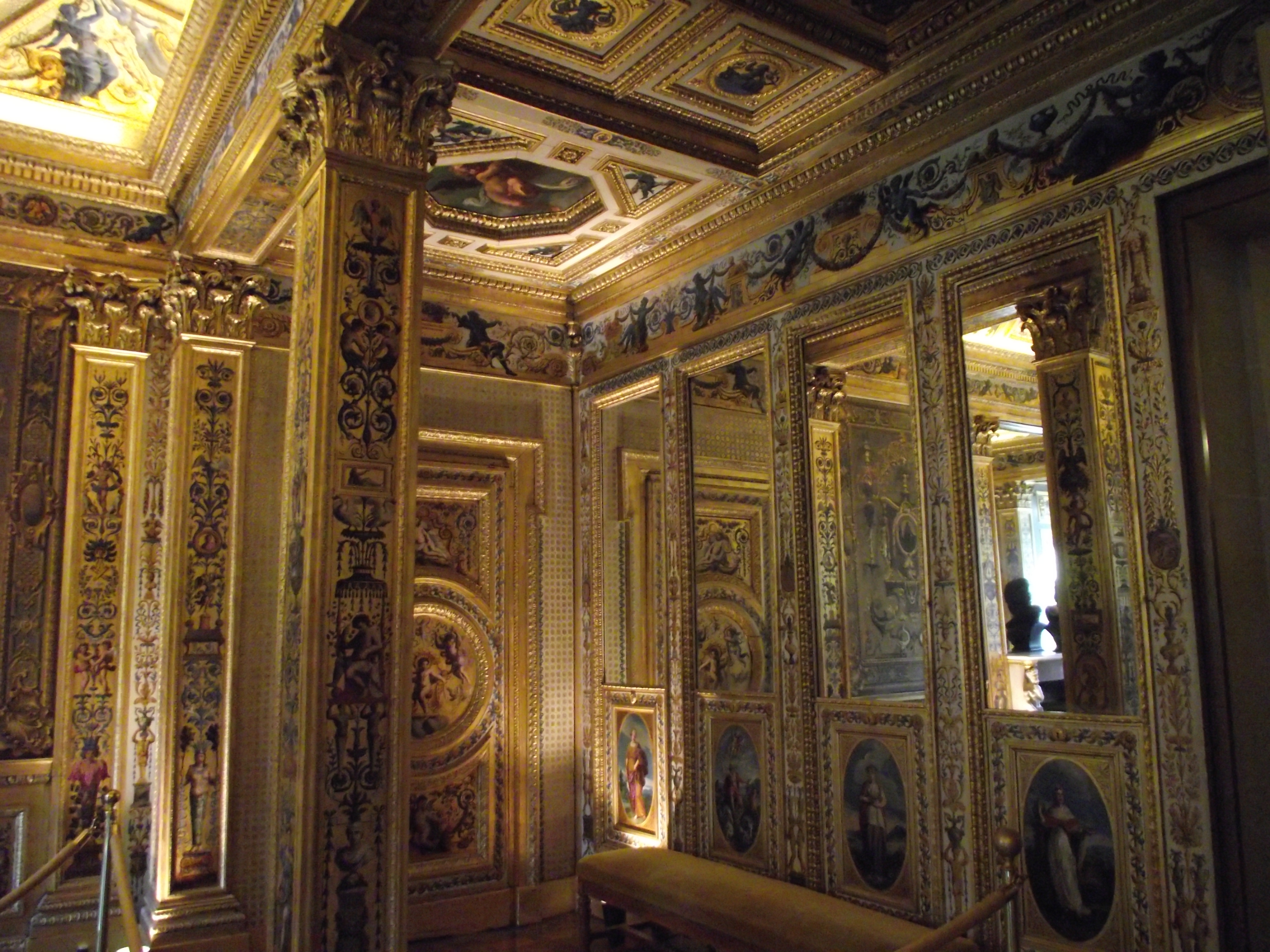 Paris, Palais du Luxembourg, Salle du Livre d'Or